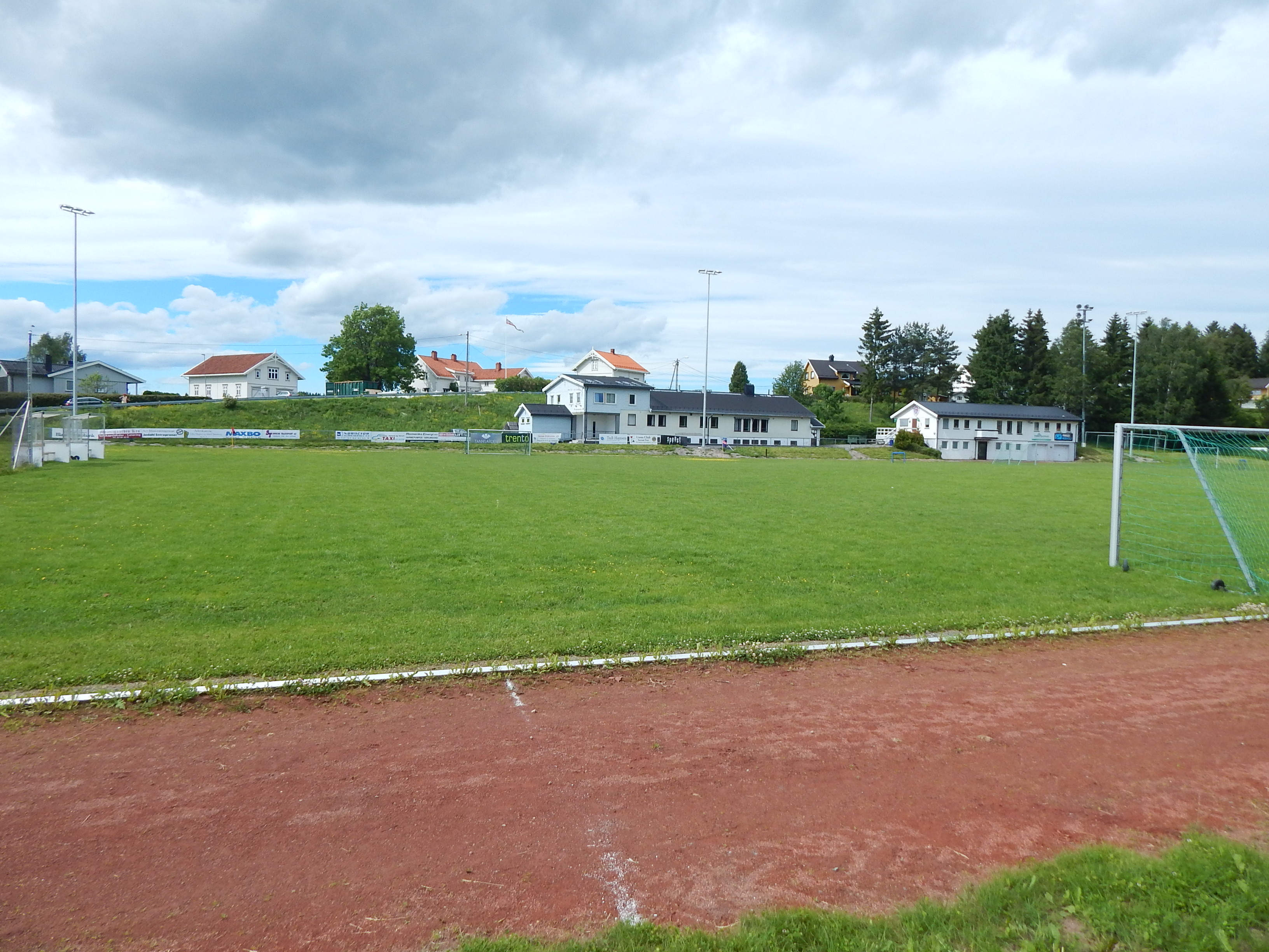 Lørenfallet idrettsplass